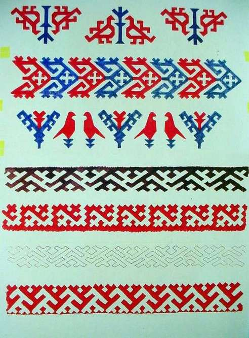 Hanti-Manysi díszítések a tobolszki múzeumból, Bérczi Szaniszló rajzai 1984-ből, a szibériai terepgyakorlatról